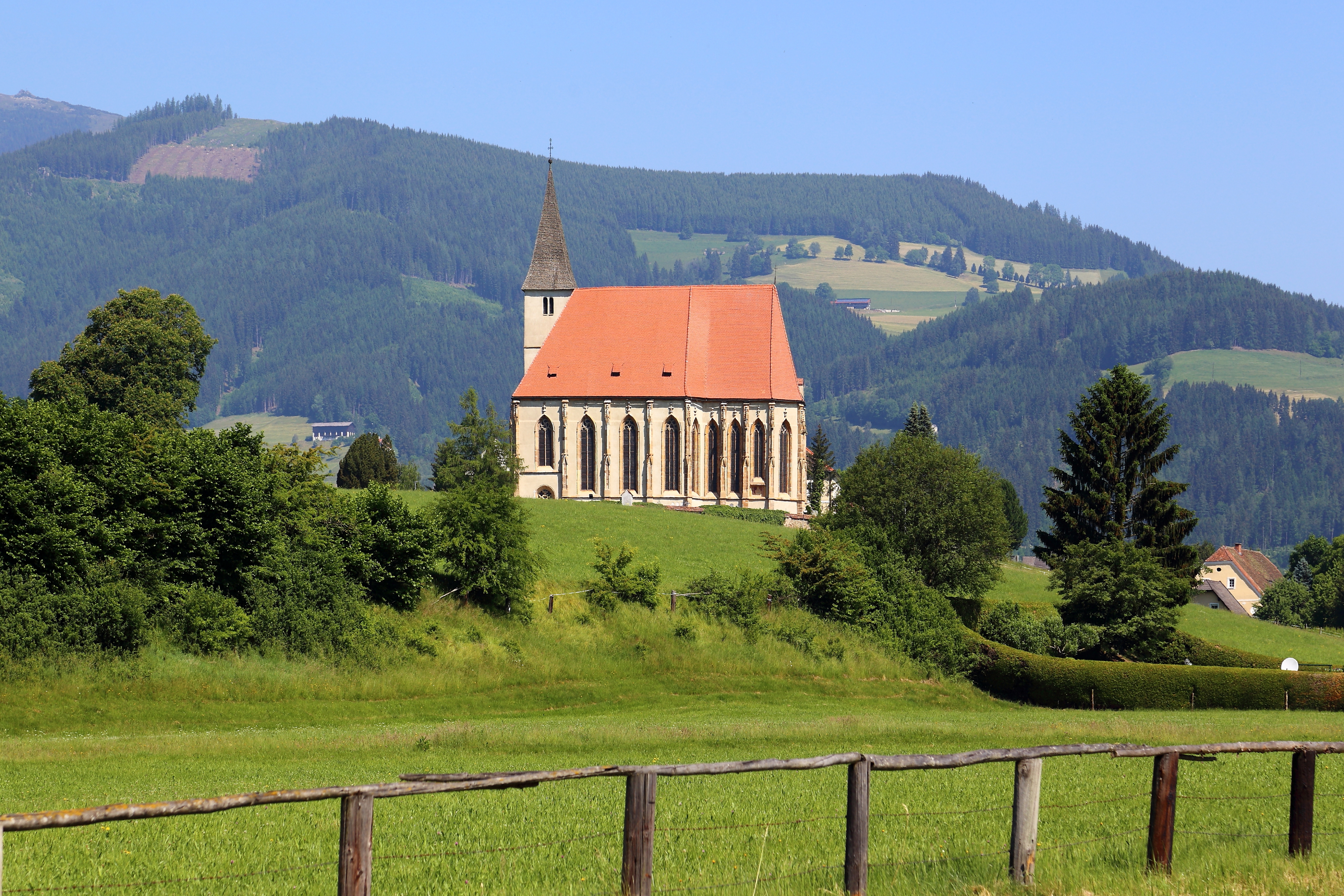 Südostansicht der katholischen Pfarrkirche von St. Marein bei Knittelfeld, ein Ortsteil der österreichischen Gemeinde St. Marein-Feistritz im steirischen Bezirk Murtal. Eine zweischiffige Hallenkirche in erhöhter Lage, die Mitte des 15. Jahrhunderts errichtet wurde. 1480 wurde die Kirche von den Türken geplündert und beschädigt. Vom Vorgängerbau ist die wohl 1364 gestiftete Annakapelle noch erhalten und dient als Sakristei. Weiters sind Teile der Nord- und Westmauer sowie das Turmuntergeschoß vom Vorgängerbau miteingebunden.